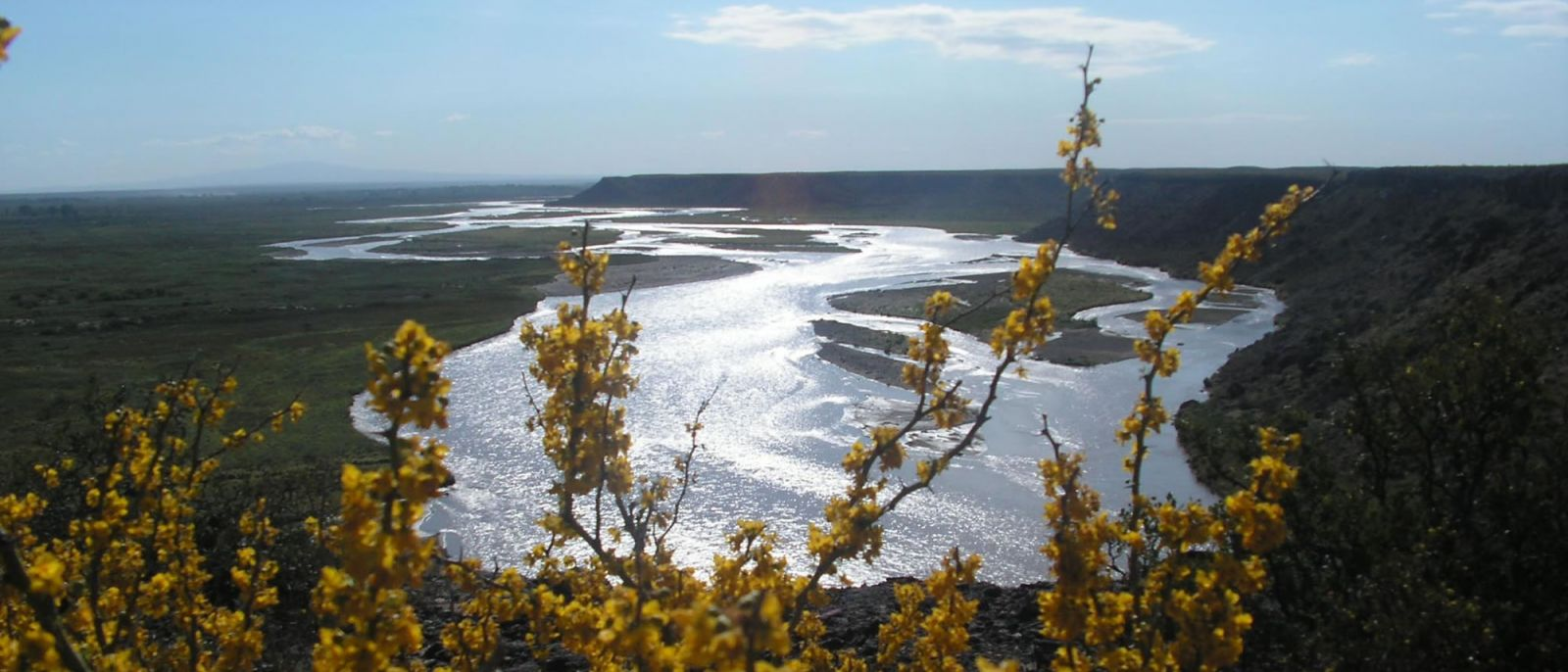 Virtaama: 148 m³/s Pituus: n. 1000 km Valuma-alue: 350 000 km² Maa: Argentiina